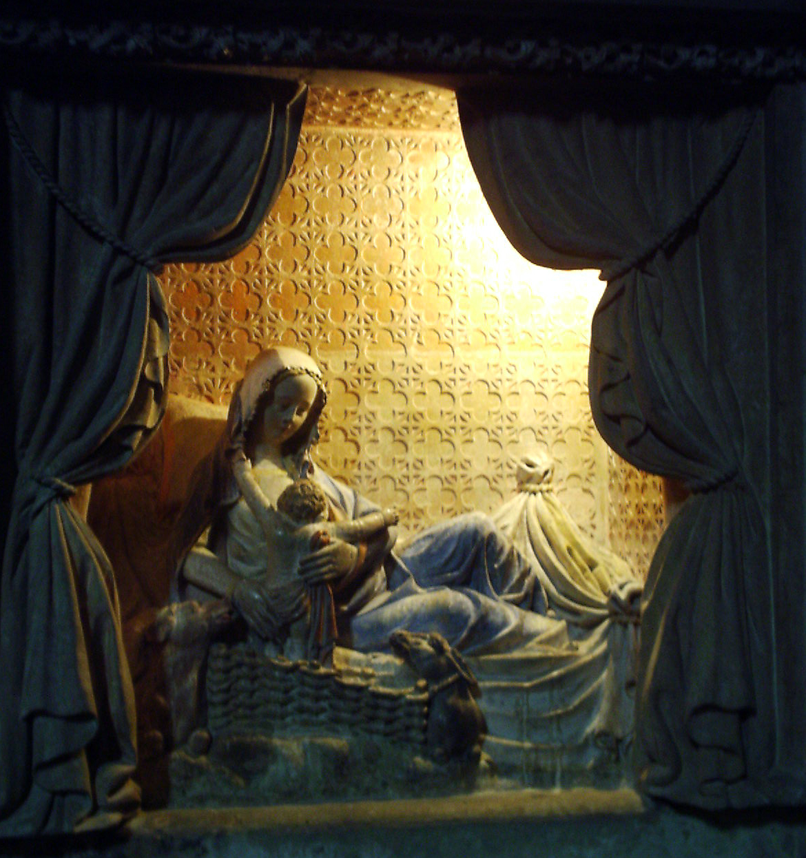 Vierge allaitante, église Saint Martin de Metz. (recadrage)